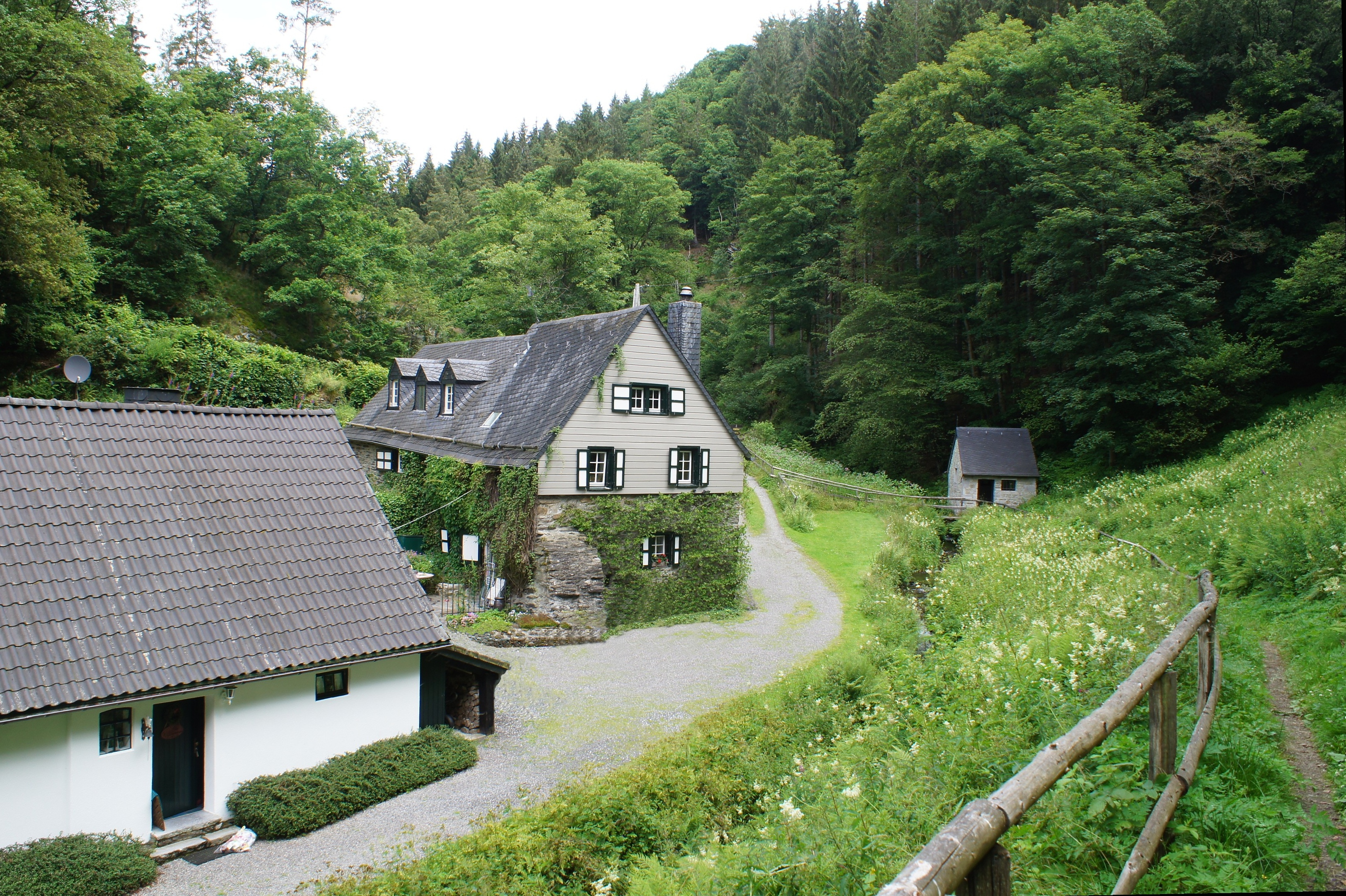 Belgenbacher Mühle, Monschau, Imgenbroich